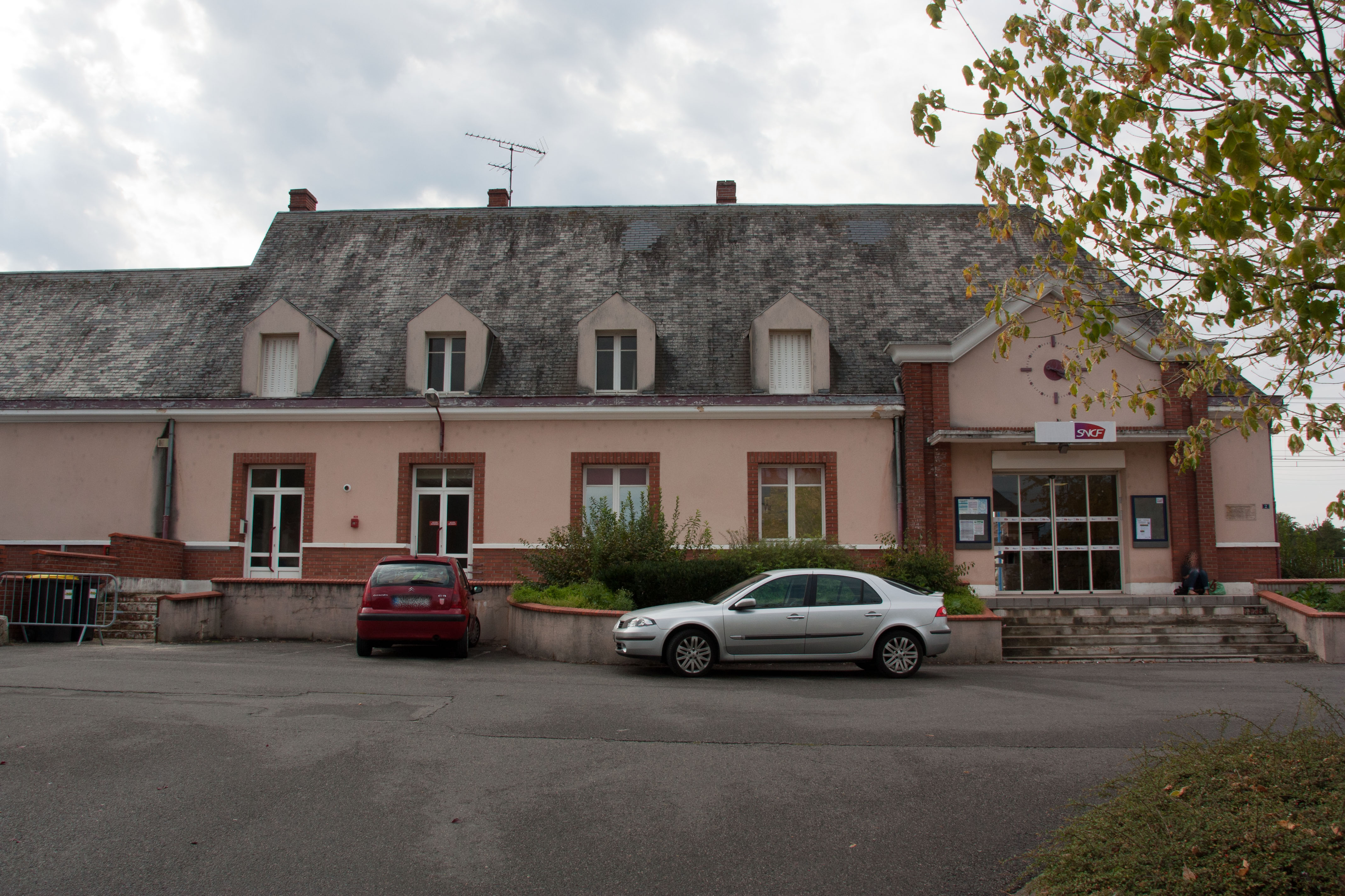 Lamotte-Beuvron (Loir-et-Cher, France) - Gare de Lamotte-Beuvron.